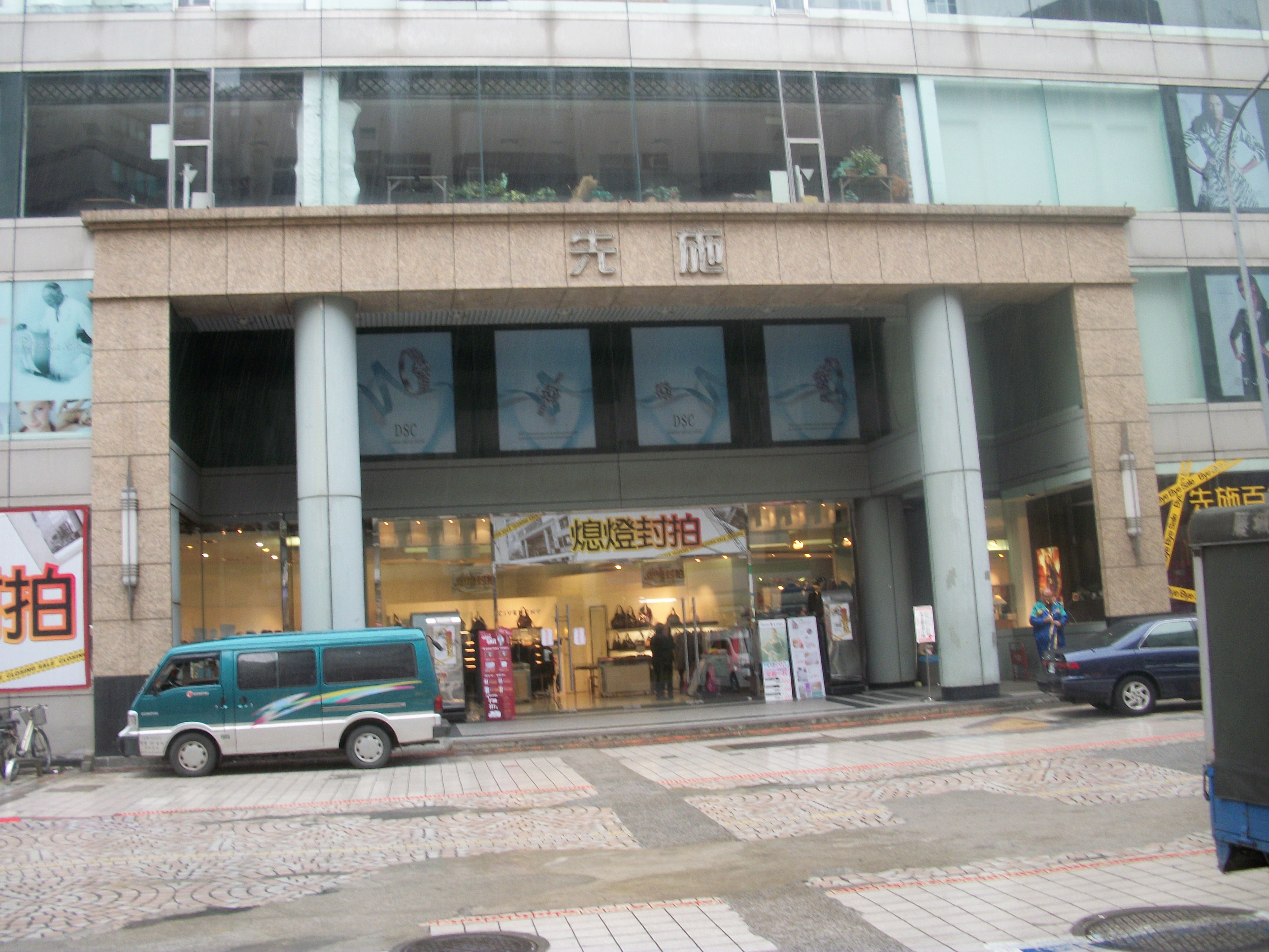 先施百貨台北店結束營業